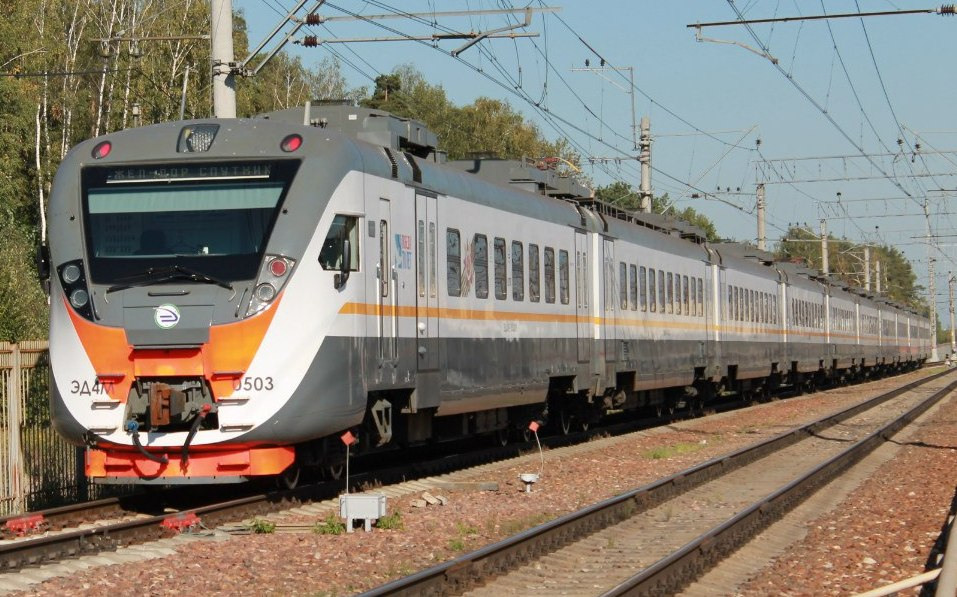 ЭД4М-0503 на станции Железнодорожная